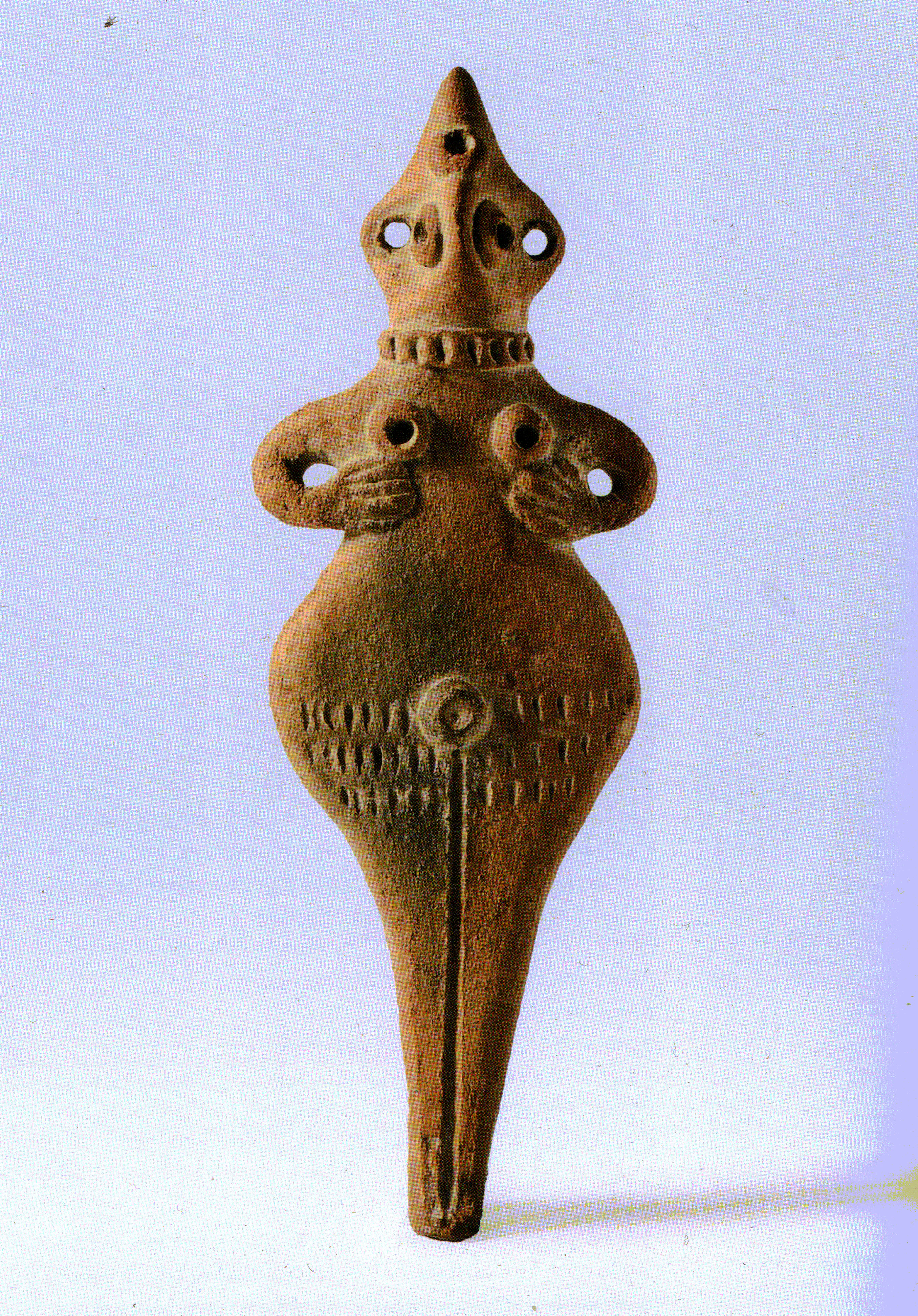 Terracotta figurines in Ancient time - Israeli National Maritime Museum. Haifa צלמיות בעת העתיקה, מאוסף המוזיאון הלאומי הימי בחיפה צלמית היא פסלון קטן ממדים בצלם אדם או בעל חיים. הצלמית יוצרה מחומרים שונים בעיקר טין, אבן ומתכת. על פי הצלמית ניתן ללמוד על מנהגי פולחן , אורחות חיים ומנהגים של התרבויות השונות לאורך ההיסטוריה. מקום הימצאן הפיזי כפי שהן נמצאות בעת חפירה ארכאולוגית מאפשר הסקת מסקנות לגבי השימושים של הצלמיות כגון, חפצי קדושה, קמע פוריות, קמע מזל ועוד. הצלמיות הקדומות ביותר במזרח הקרוב הופיעו בתקופה הניאוליתית קדם-קראמית (מחצית האלף ה-9 לפנה"ס – ועד סוף האלף ה-6 לפנה"ס) צלמית אשה מחרס, צלמיות מטיפוס זה מציגות אשה עירומה, עומדת לחזית, רגליה מופרדות בעזרת חריץ. לצלמיות נקבים רבים בפנים, אף בולט, פה חסר, ועל צווארן שרשרת. צלמיות מסוג זה אופייניות לצפון סוריה בראשית האלף השני לפנה"ס. הצלמית מתקופת הברונזה התיכונה ב1 This image was taken as part of the Wikipedia Loves Art project and is uploaded curtesy of the National Maritime Museum in Haifa. In any use of this image credit need be given to the Museum as well as the photographer. The copyright holder of this file allows anyone to use it for any purpose, provided that the copyright holder is properly attributed. Redistribution, derivative work, commercial use, and all other use is permitted. This image was taken as part of the Elef Millim project trip and within the Wikipedia Loves Art project to the National Maritime Museum in Haifa in the northern part of Israel, which was held on Friday, 22nd January 2010. To view all images uploaded as pary of the Elef Millim Project